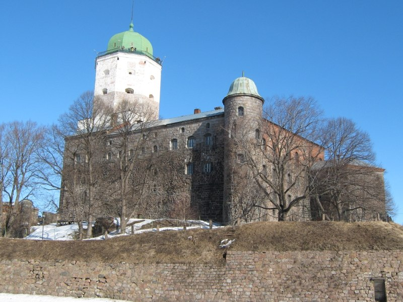 Башня Олафа (Лен.область, Выборг, Выборгская слобода, о. Замковый)